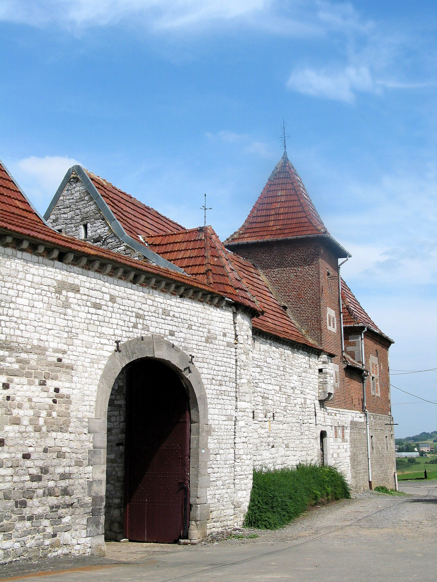 Bonneville (Belgique), Ferme de Dhuy (XVI/XVIIe siècles).